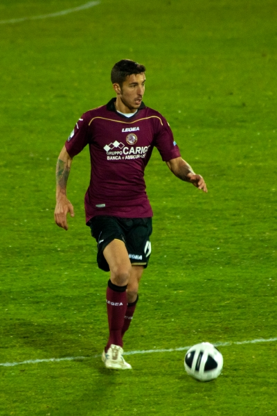 Immagine del calciatore Federico Ceccherini con la maglia del Livorno del 2012/2013